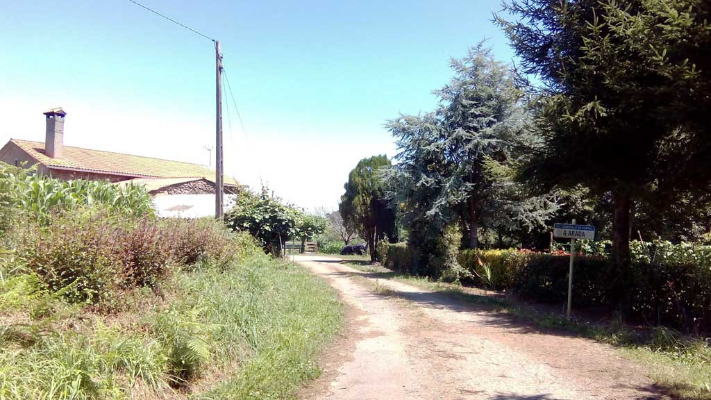 Vista da Arada, Curtis.